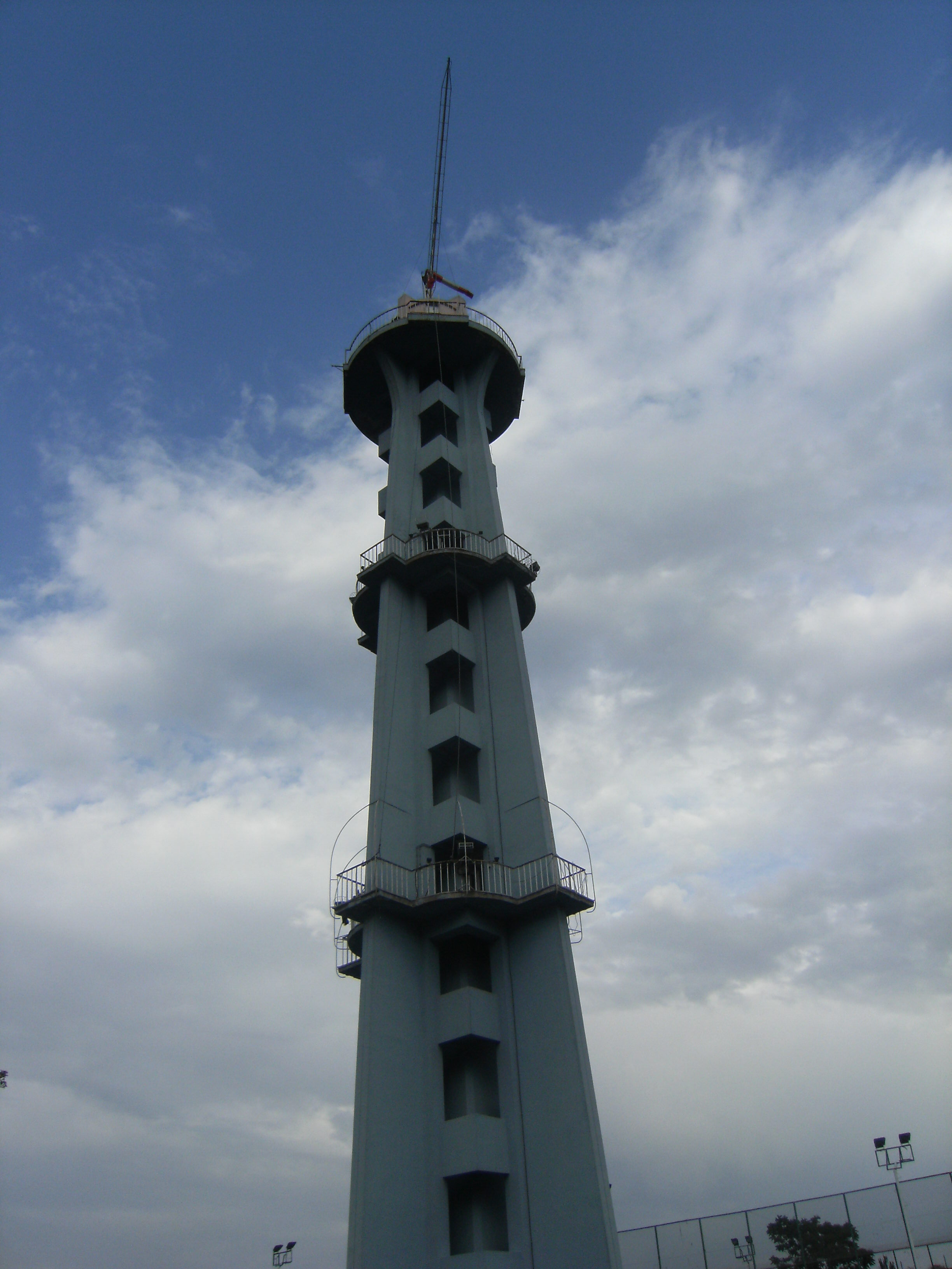 Ankara Türk Hava Kurumu Müzesi yanında bulunan paraşüt kulesi